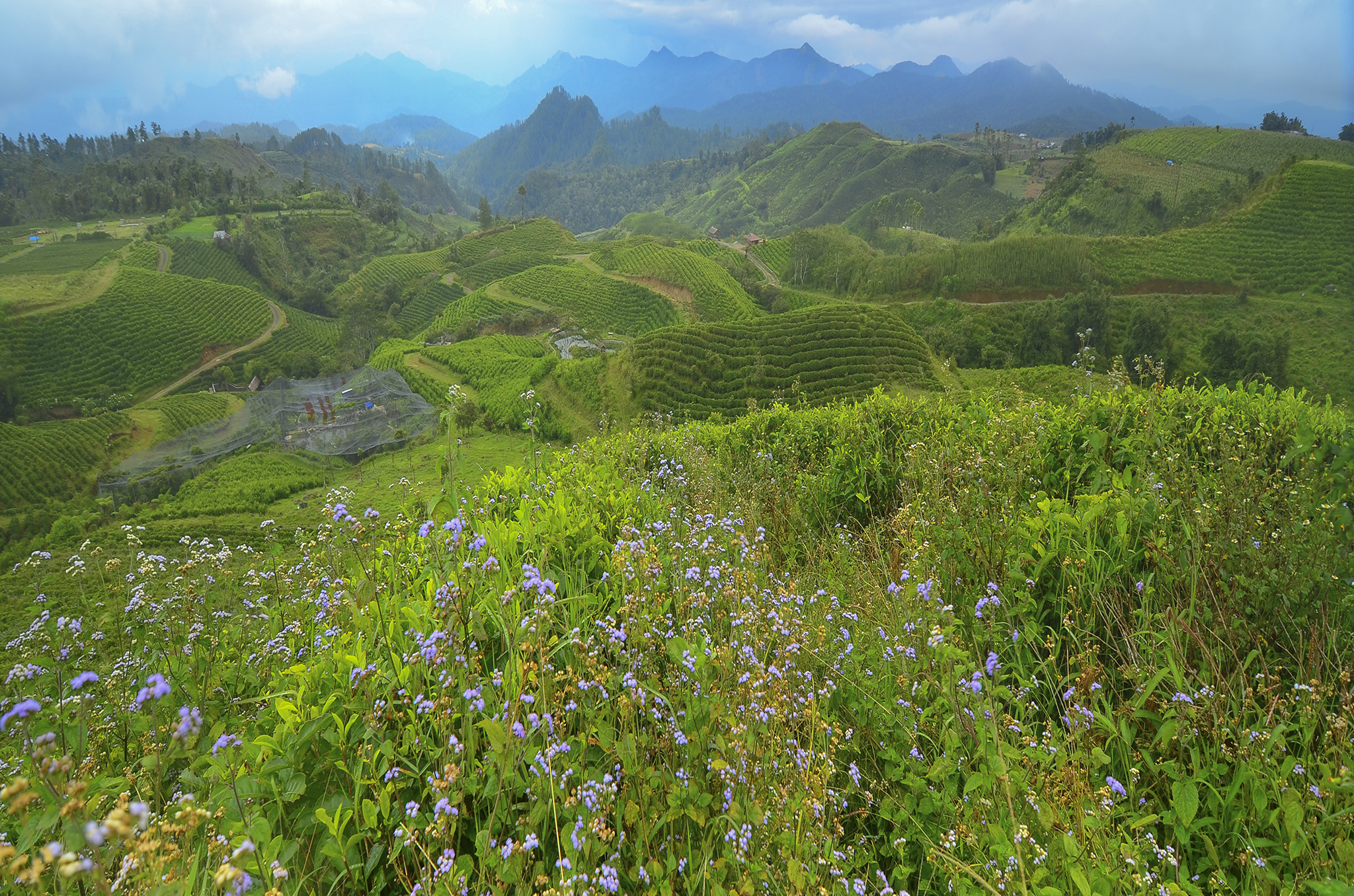 Kebun Teh di Kabupaten Malino ini belum terlalu banyak di kenal oleh orang-orang di luar kabupaten malino provinsi sulawesi selatan. Untuk dapat sampai ke tempat ini cukup menempuh perjalanan kruang lebih 3jam dari pusat kota makassar provinsi sulawesi selatan (indonesia). Selain dengan keindahan kebun teh, di malino juga banyak terdapat beraneka ragam buah-buahan.